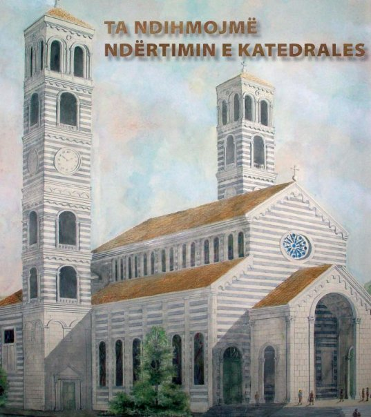 Acquerello realizzato dall'Autore